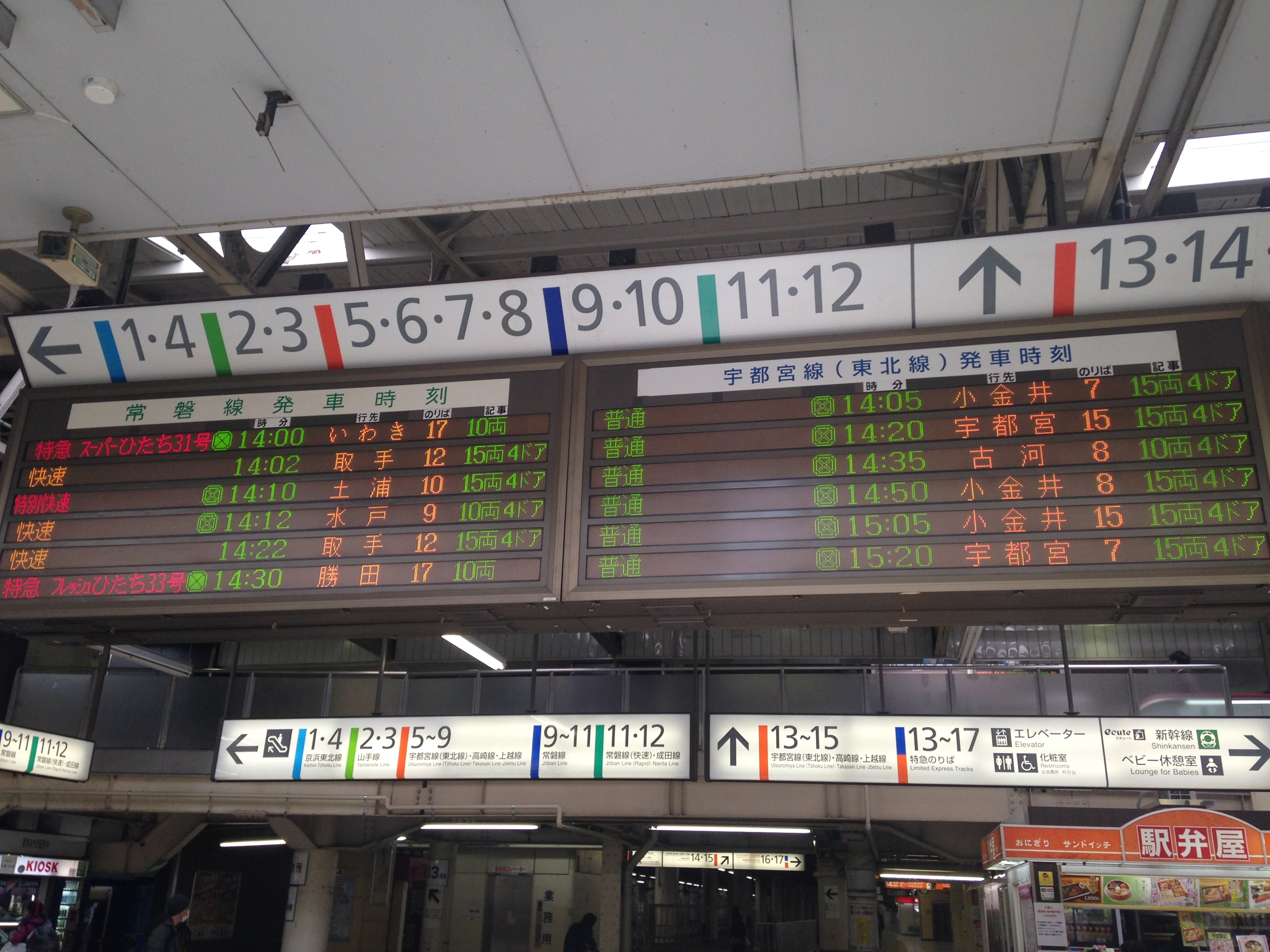 上野駅の宇都宮線・常磐線方面電光掲示板